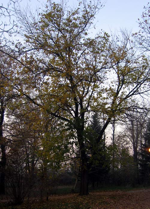 аутор Снежана Трифуновић Биљни органи